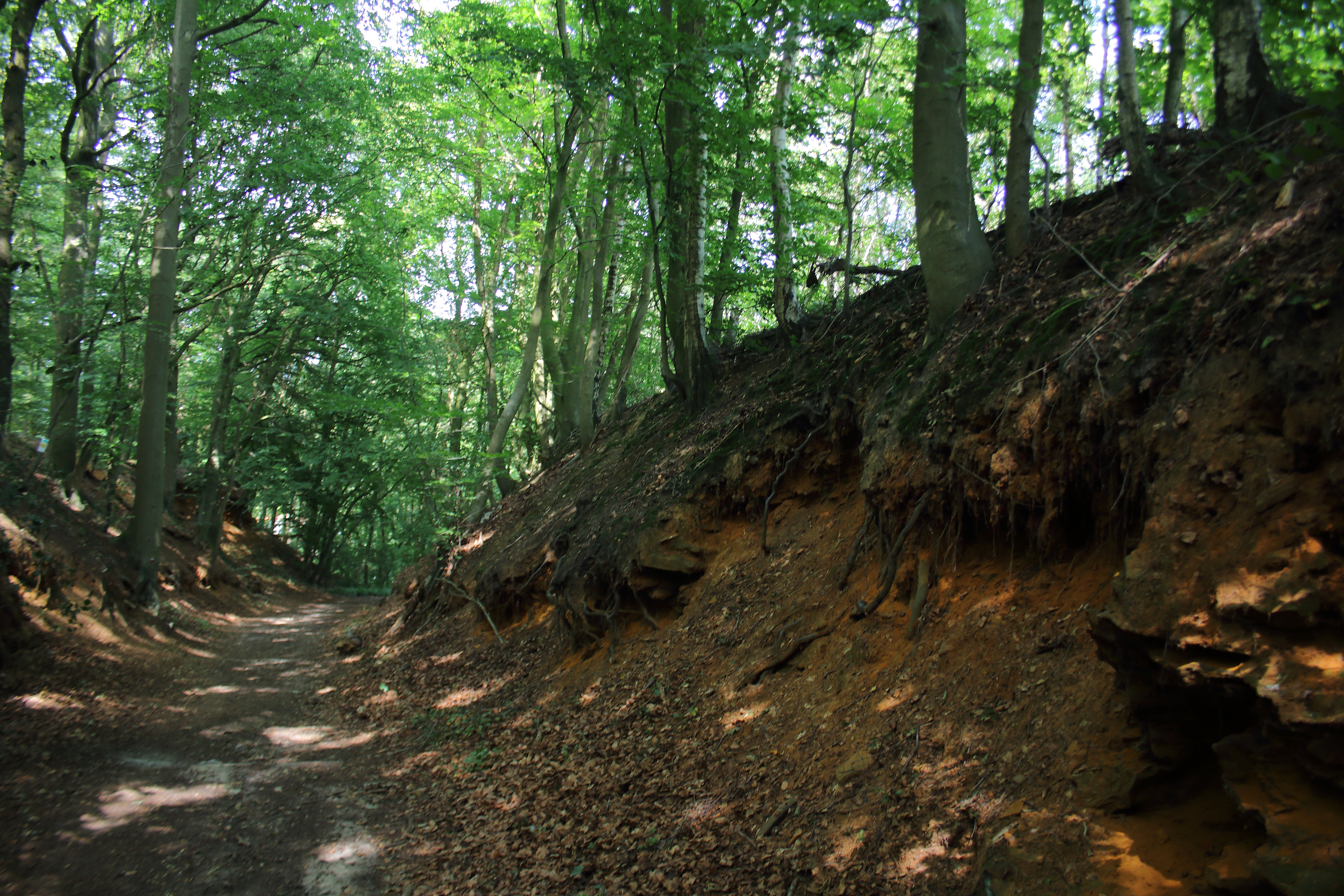 Bois du Pottelberg - Pottelbergbos, Flobecq - Vloesberg, Pays des Collines, Hainaut - Henegouwen, Wallonie - Wallonië, Belgique - België